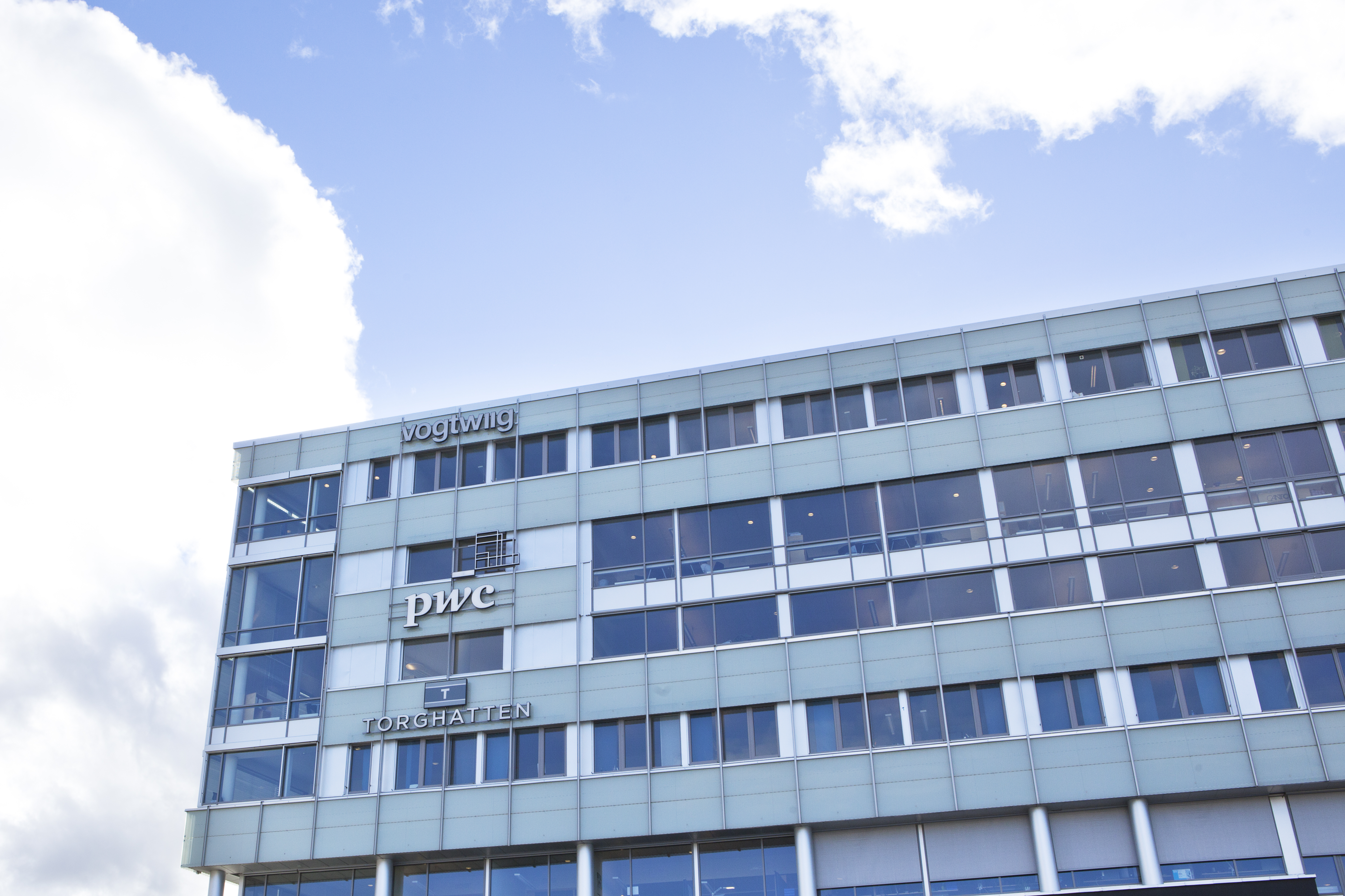 PwCs bygning i Trondheim